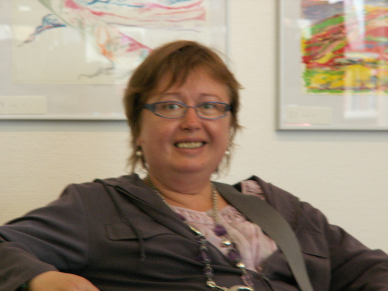 Gabriella Klintred, vid utställning på biblioteket vid Vårväderstorget i Göteborg, 10 augusti 2010.